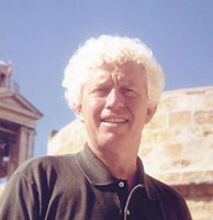 Odd Karsten Tveit, norsk utenrikskorspondent i Midøsten for NRK